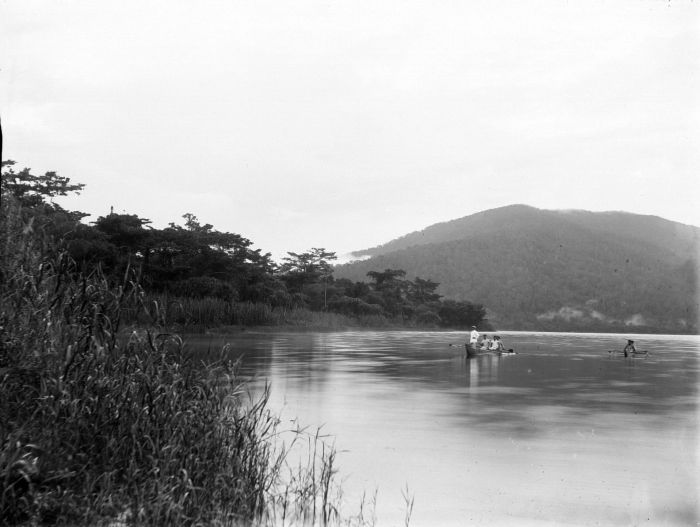 Negatief. Prauwen op een meer of langs de kust, Boeroe